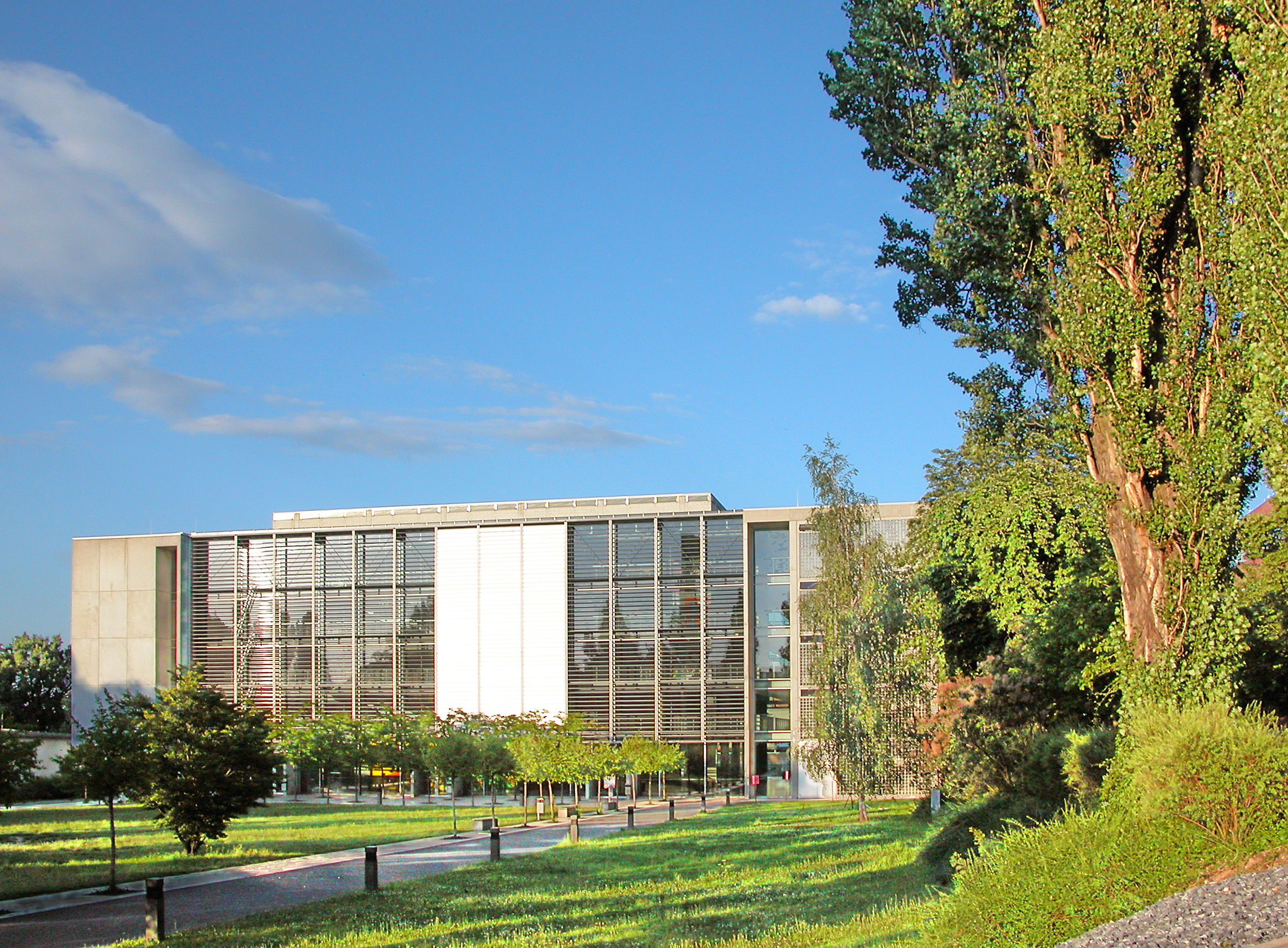 07.07.2007 01069 Dresden-Südvorstadt, Bergstraße 64 (GMP: 51.028798,13.730019) : Hörsaalzentrum der TU Dresden, 1998 fertiggestellt. Sicht von Westen. [DSCN28371.TIF]20070707230DR.JPG(c)Blobelt